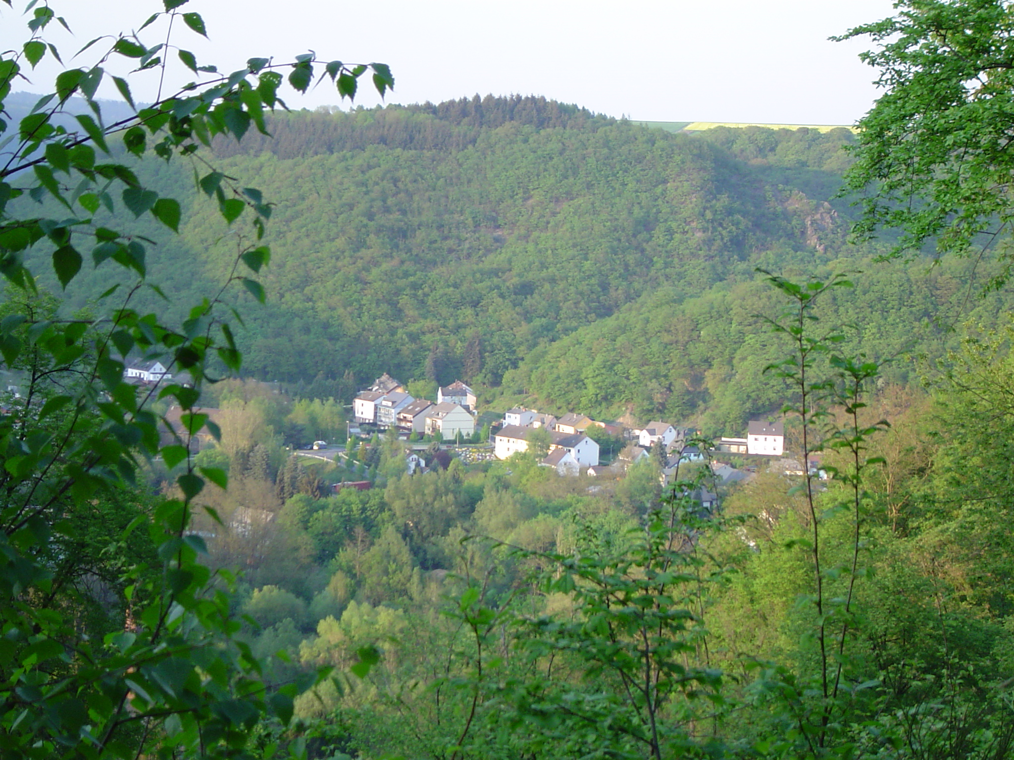 Blick auf Friedrichssegen